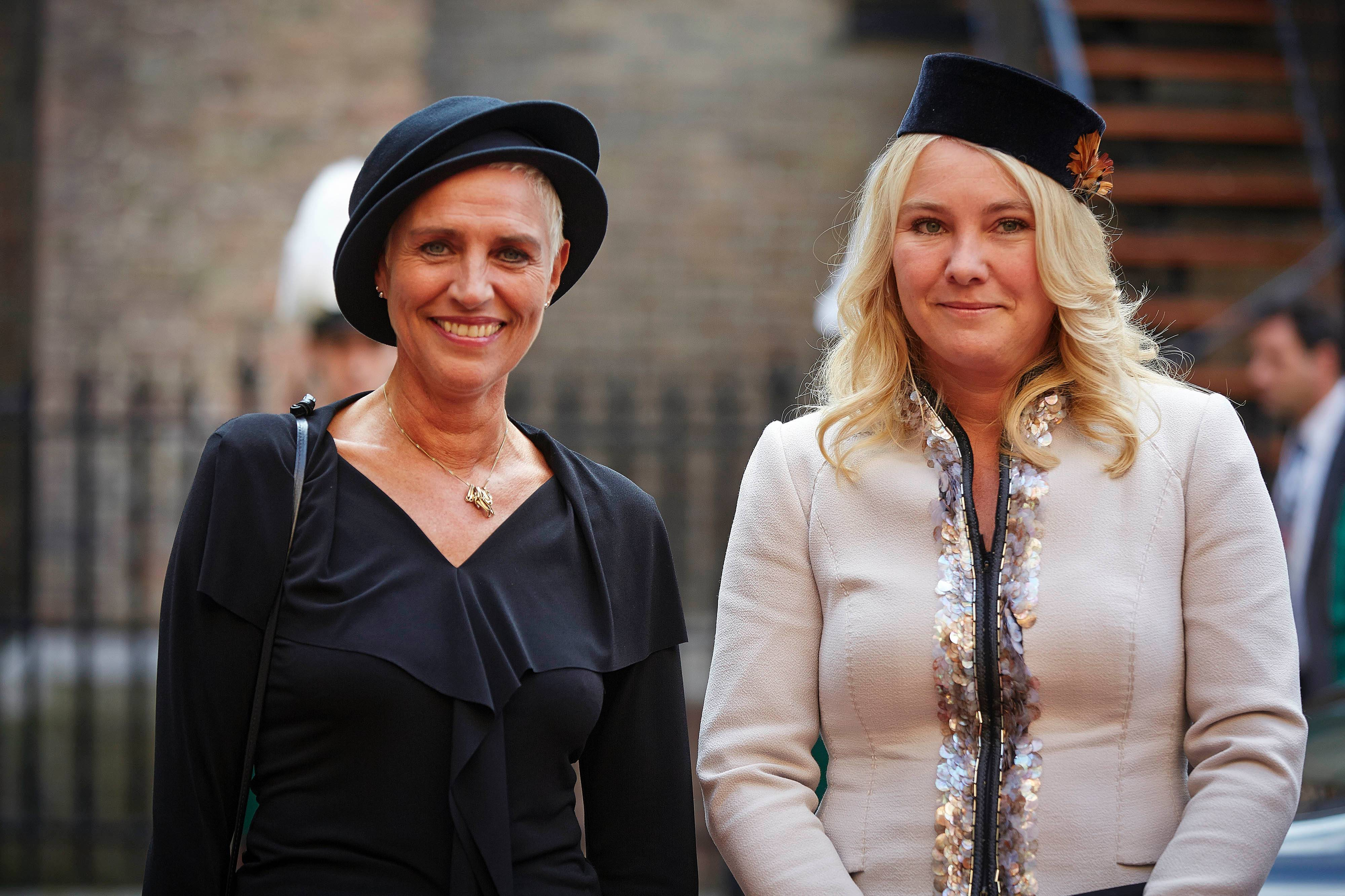 Wilma Mansveld (links) en Melanie Schultz op Prinsjesdag 2014